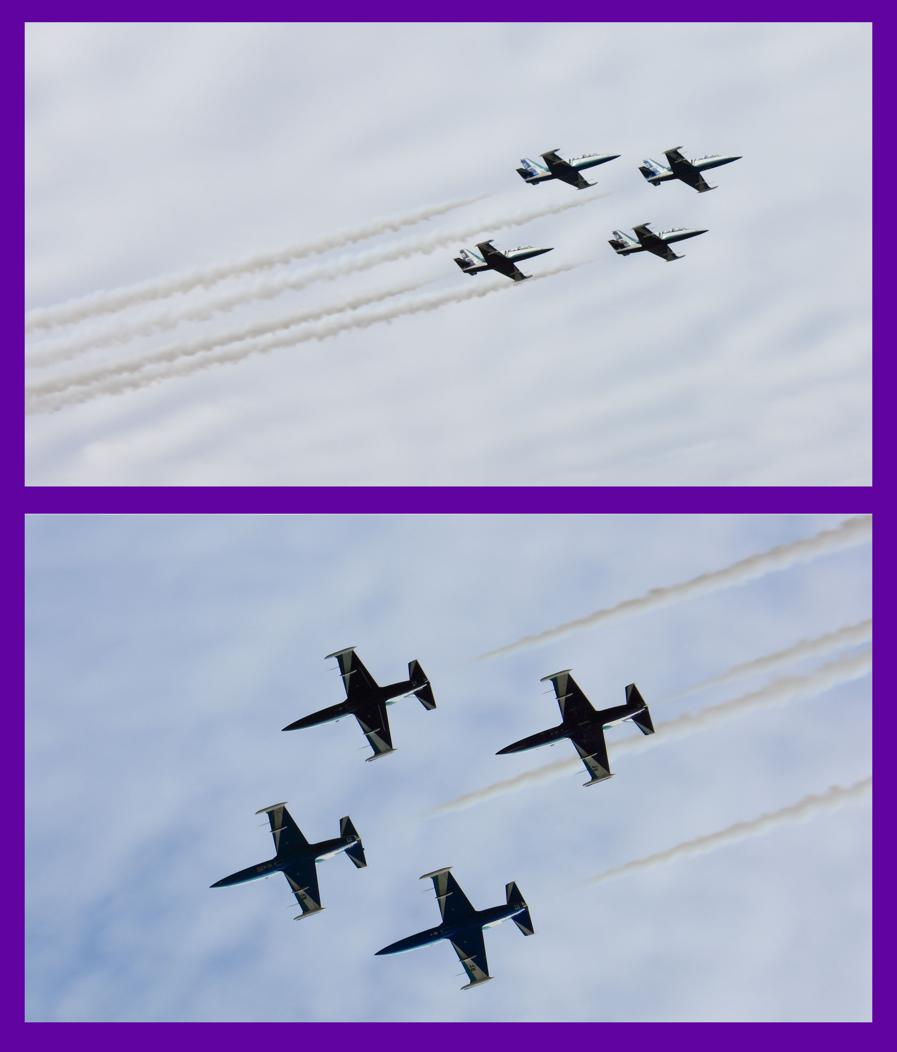 Авиашоу пилотажной группы «Русь» над островом Ягры.